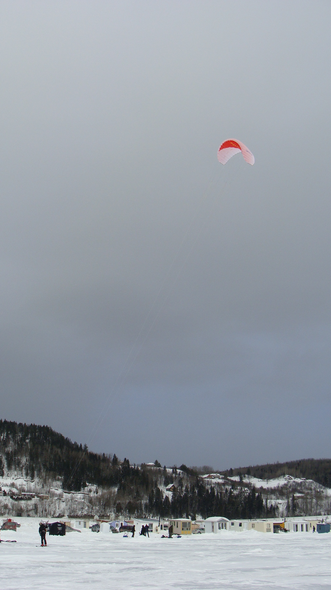 Ski sur glace à l'aide d'un « parachute ». À Saint-Fulgence, au Québec (Canada).